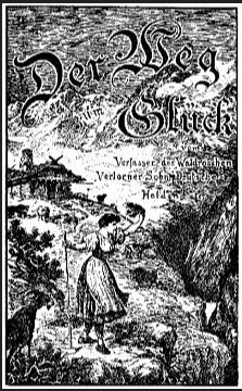 Ilustrace k románu Karla Maye Cesta za štěstím